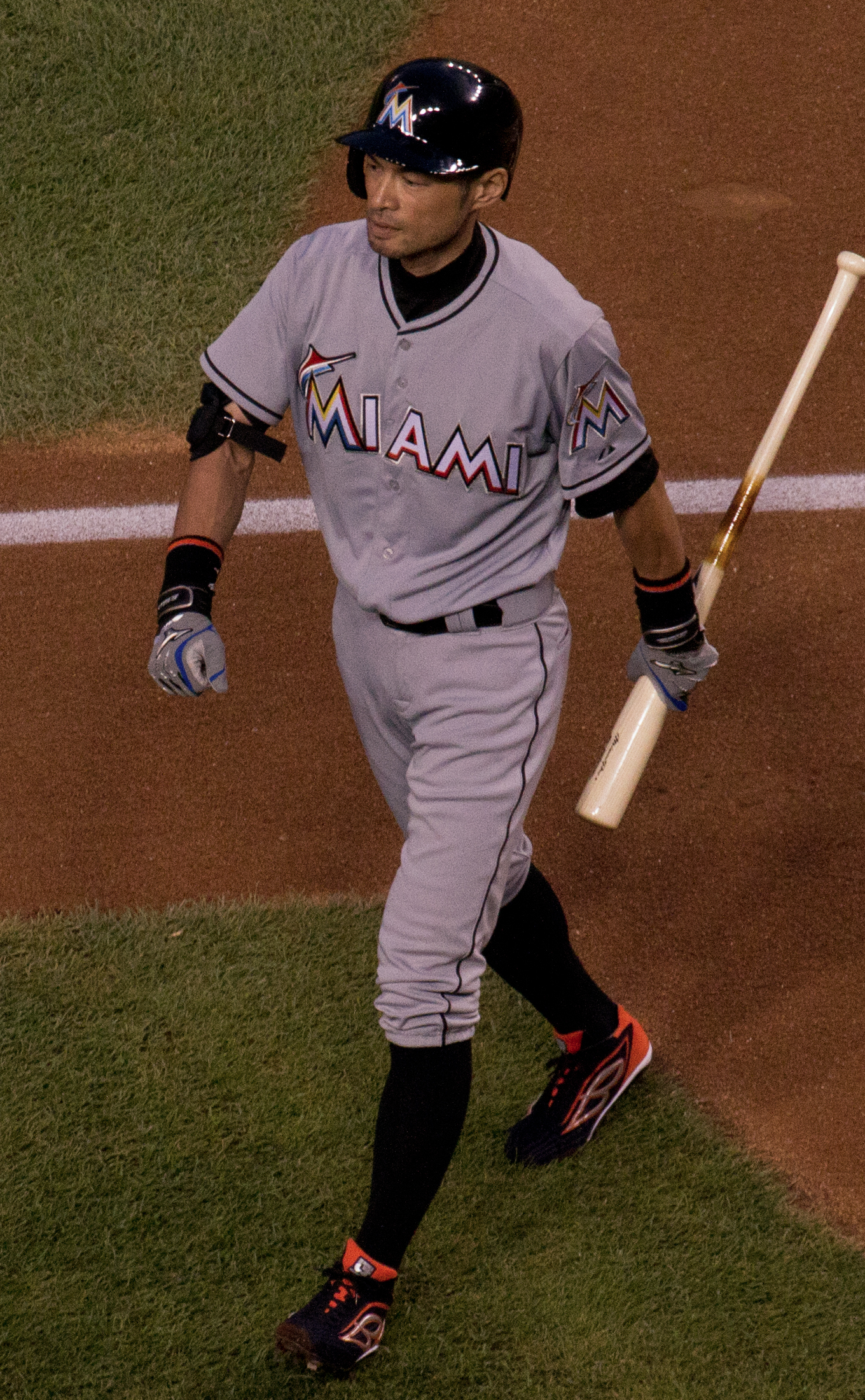 Ichiro Suzuki